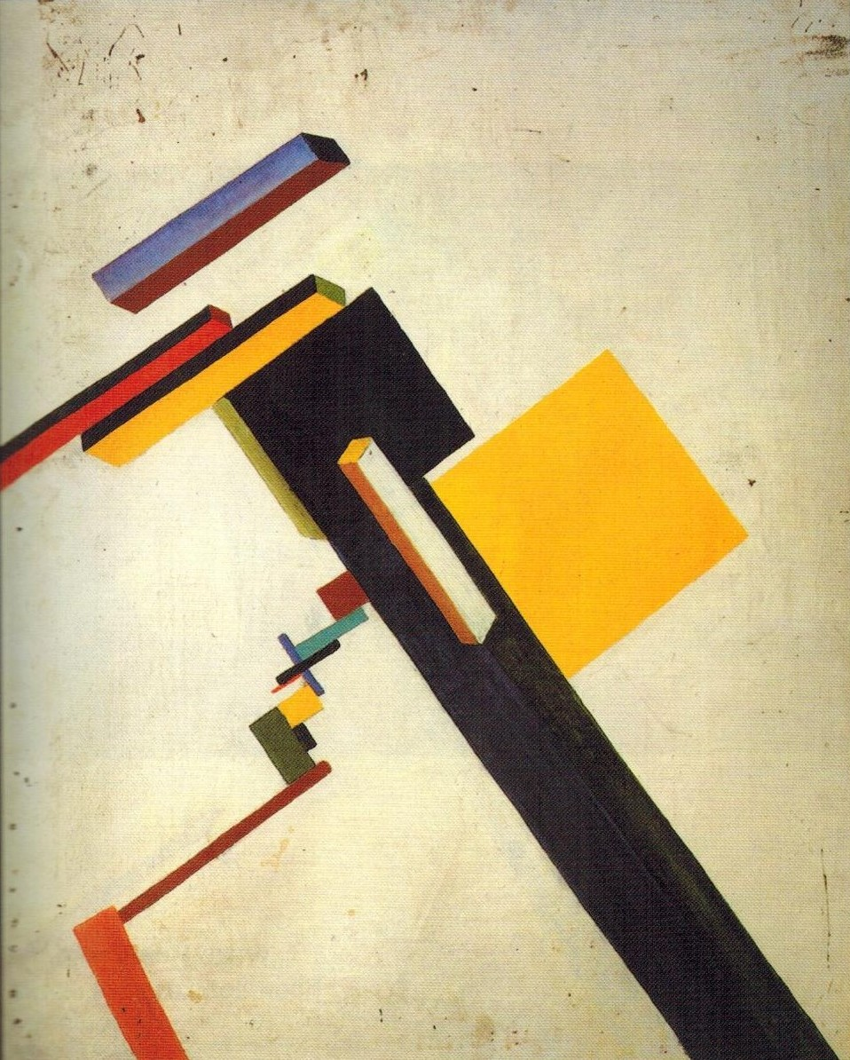 Сергей Сенькин. Беспредметная композиция. 1920. Картон, масло. 100х81